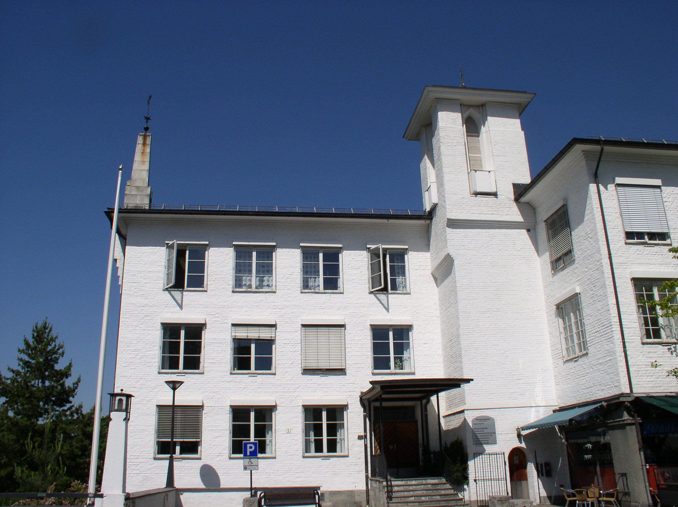 Brambanigården i Sandvika, arkitekt: Johan den yngre Meyer, 1937; utvidet av Magnus Poulsen i 1956